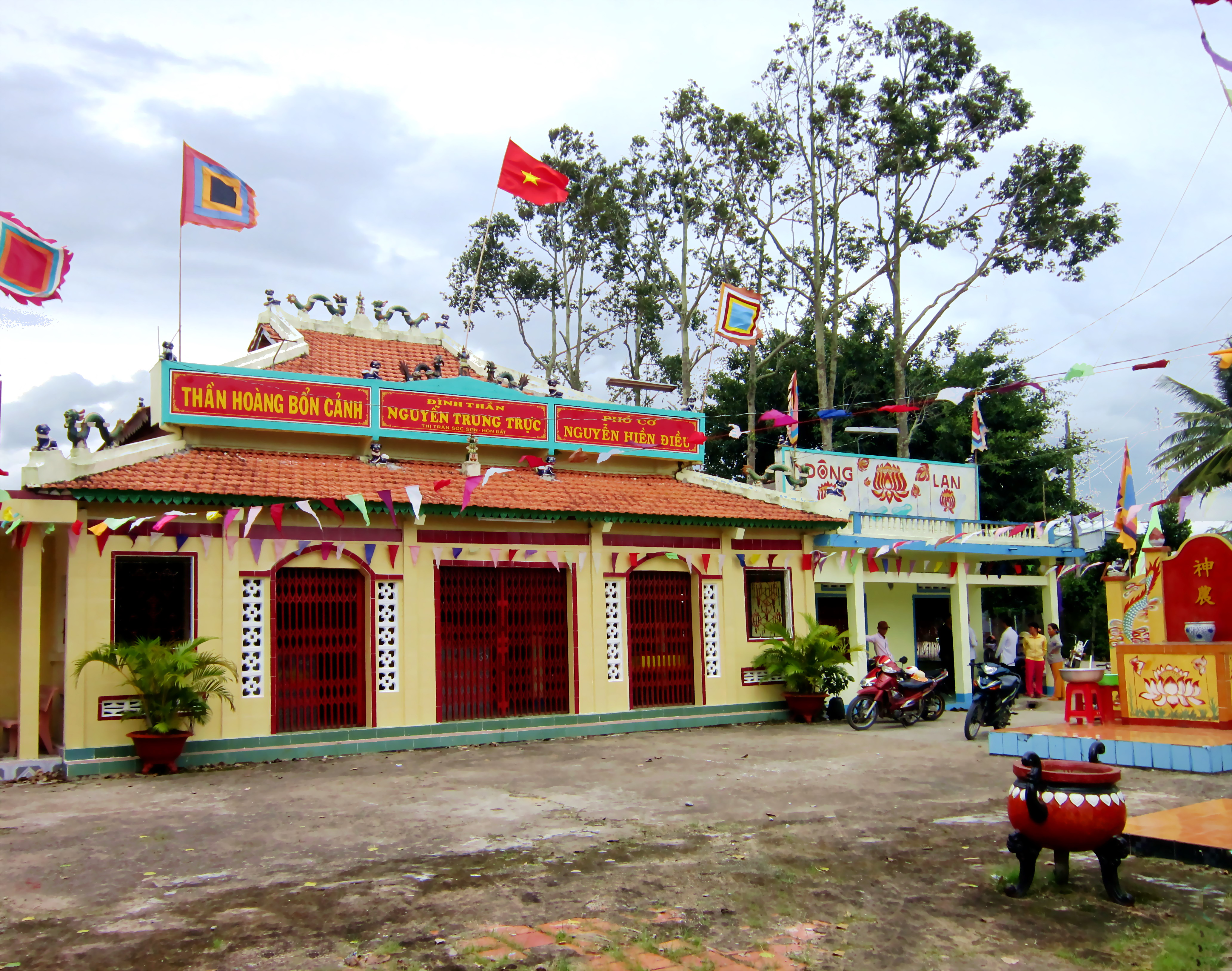 Đình thần Nguyễn Trung Trực ở thị trấn Sóc Sơn, thuộc huyện Hòn Đất, tỉnh Kiên Giang, Việt Nam. Ngoài Anh hùng dân tộc Nguyễn Trung Trực (1839 ?–1868) trong đình còn thờ Thần hoàng Bổn cảnh và Phó cơ Nguyễn Hiền Điều (? - 1834).